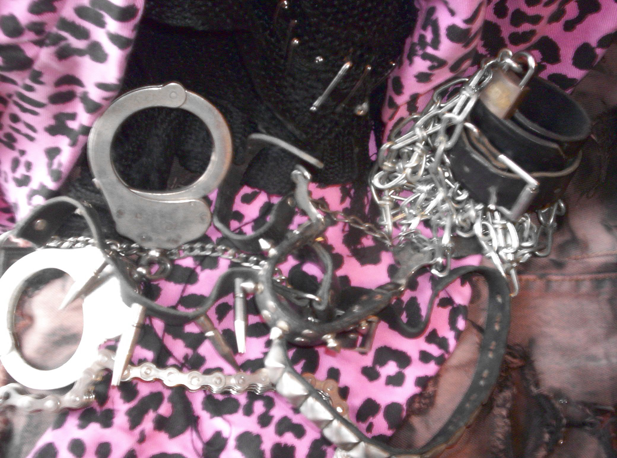 punk's accessories. divers accessoires punk : chaines, tripplex, clous, cadenas, épingles à nourrice. taken on october 19, 2005.